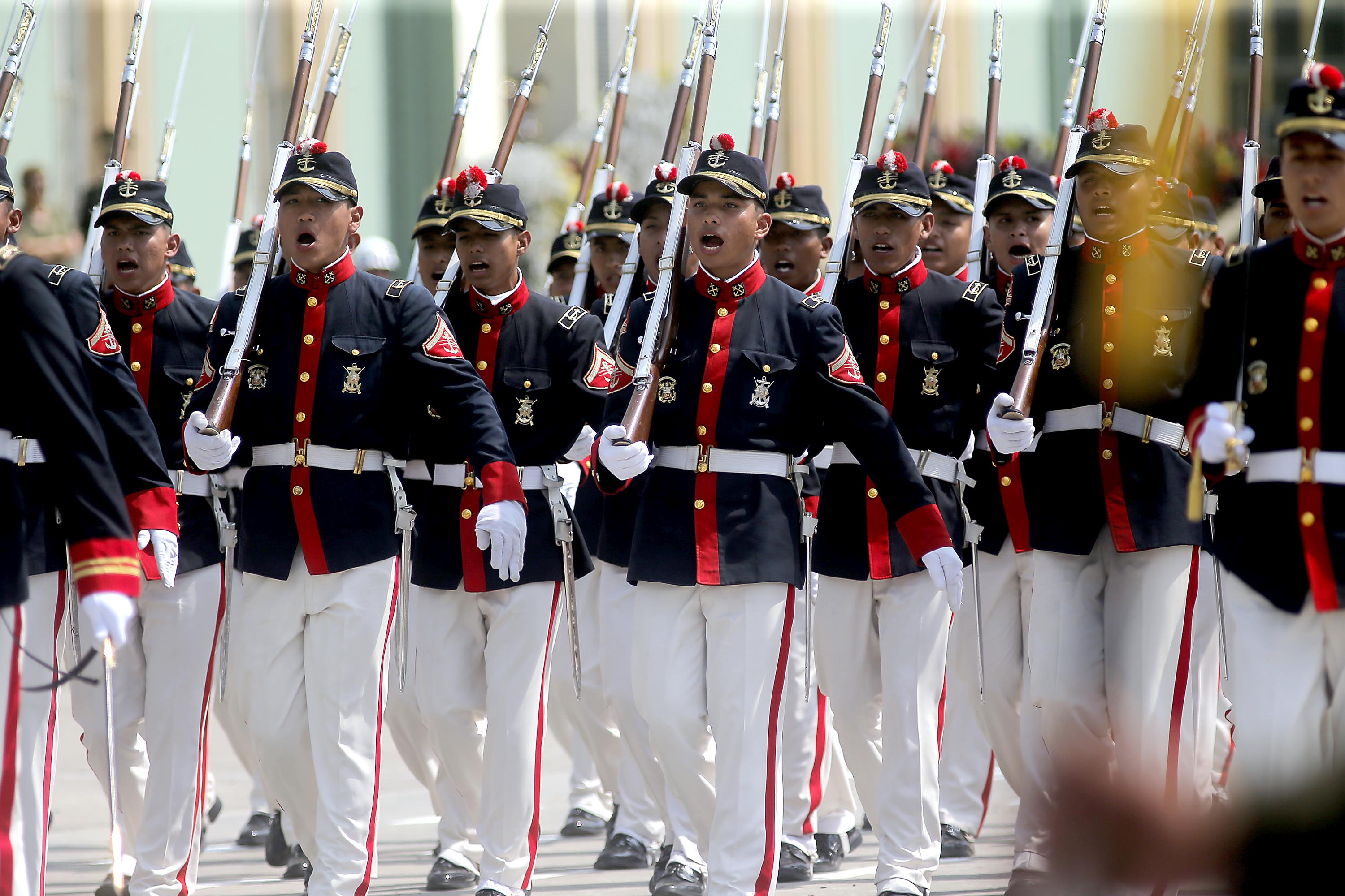 Ceremonia por el 190° Aniversario de la Batalla de Ayacucho y día del Ejército del Perú